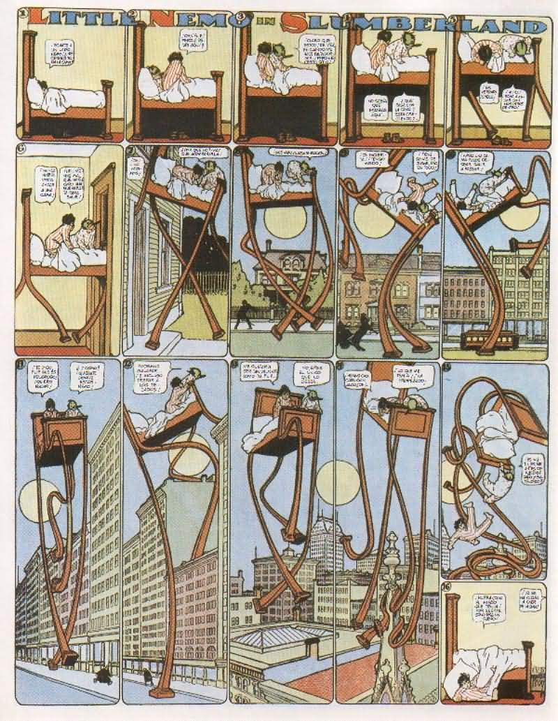 Seite des Comicstrips Little Nemo in Slumberland